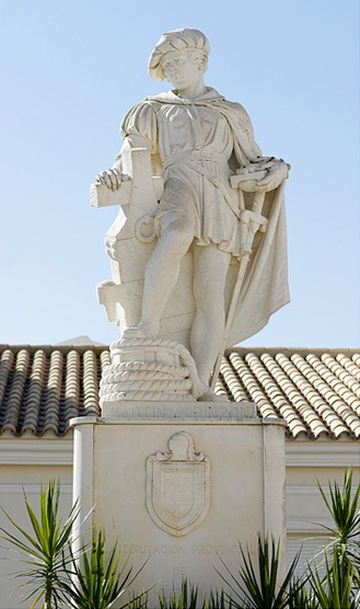 Estatua de Martín Alonso Pinzón, en Palos de la Frontera. Escultor Antonio Pinto Soldán, Exposición Iberoamericana de Sevilla de 1929. Trasladada en 1945 a Palos de la Frontera.